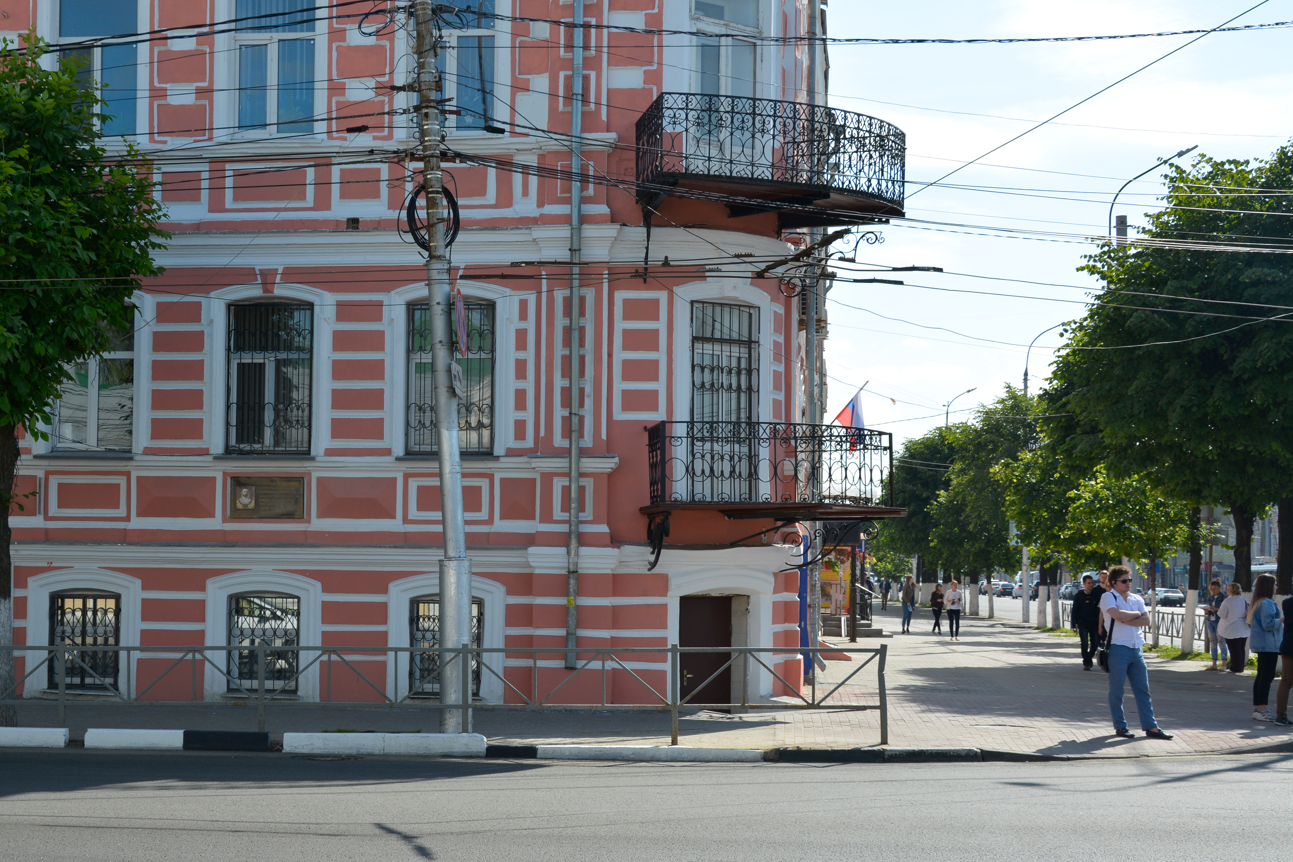 Место убийства рязанского полицмейстера Г.К. Хорото у гостиницы Лапина (перекресток улиц Соборной и Астраханской) в Рязани